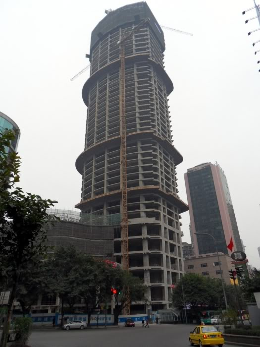 GTGCCCCCCCCCC